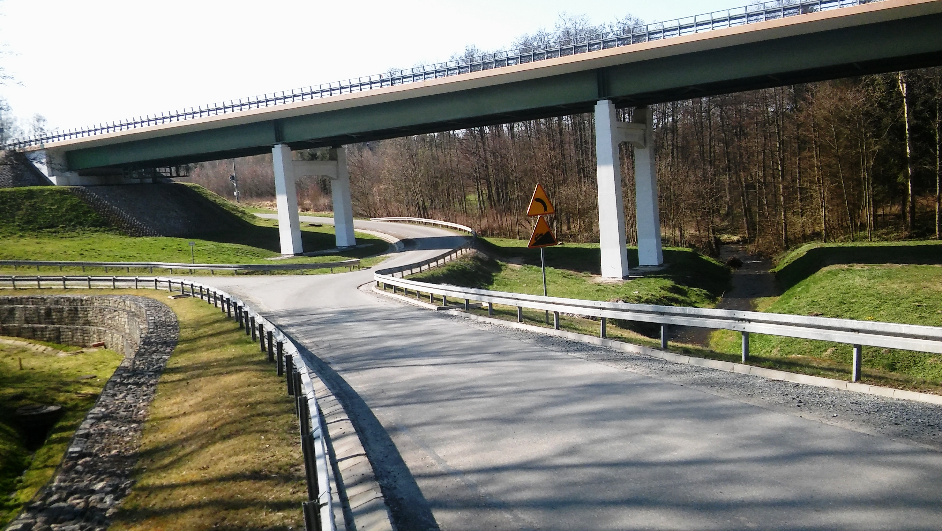 Most Omaza S22 Berlinka Grzechotki